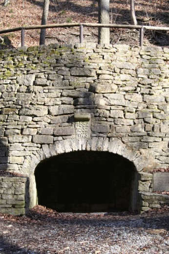 fons principalis Ienensis